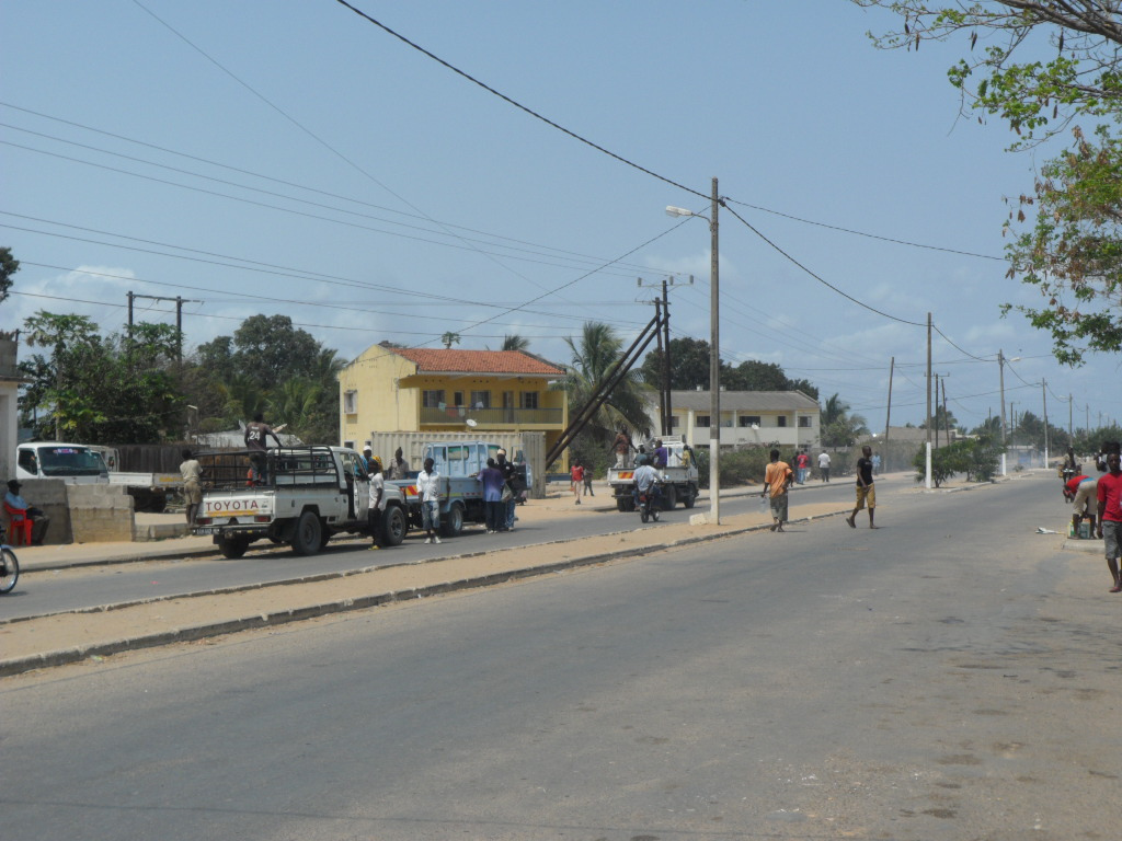 Mocimboa_da_Praia_08